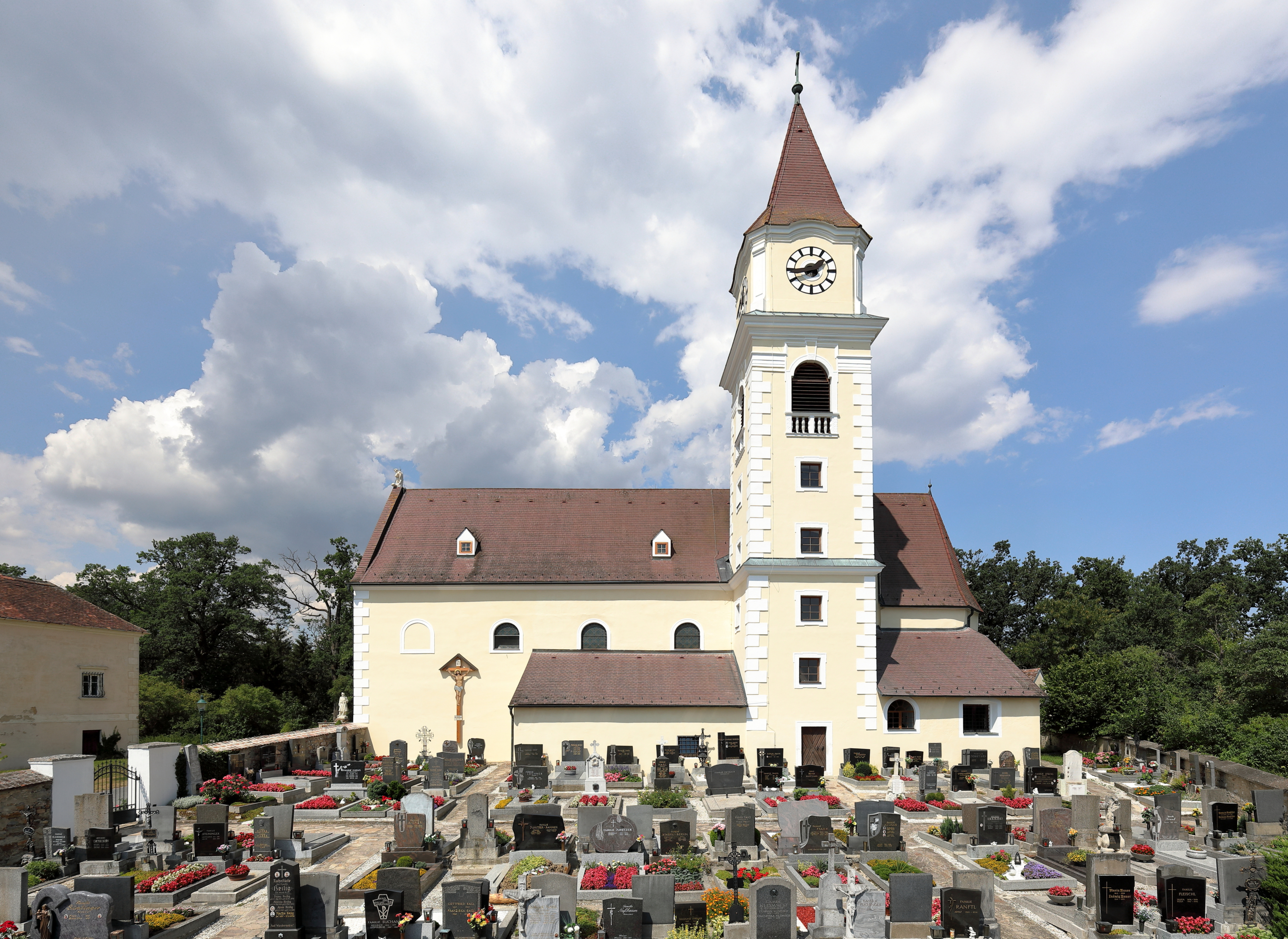 Südansicht der röm.-kath. Pfarrkirche hl. Michael, auch als „Maria Eich“ bezeichnet, der niederösterreichischen Gemeinde Röhrenbach.Ursprünglich eine romanische Chorquadratkirche wurde die Kirche um 1500 mit einem spätgotischen Chor mit Fünfachtelschluss erweitert. Ende des 17. Jahrhunderts fand ein umfassender Umbau statt, dabei wurde auch der Turm errichtet, und in der ersten Hälfte des 18. Jahrhunderts erfolgte die Barockisierung des Innenraums.